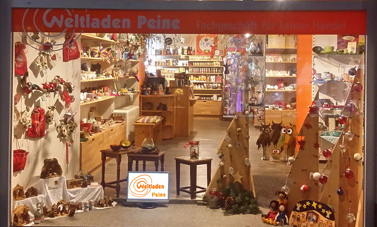 Weltladen Peine